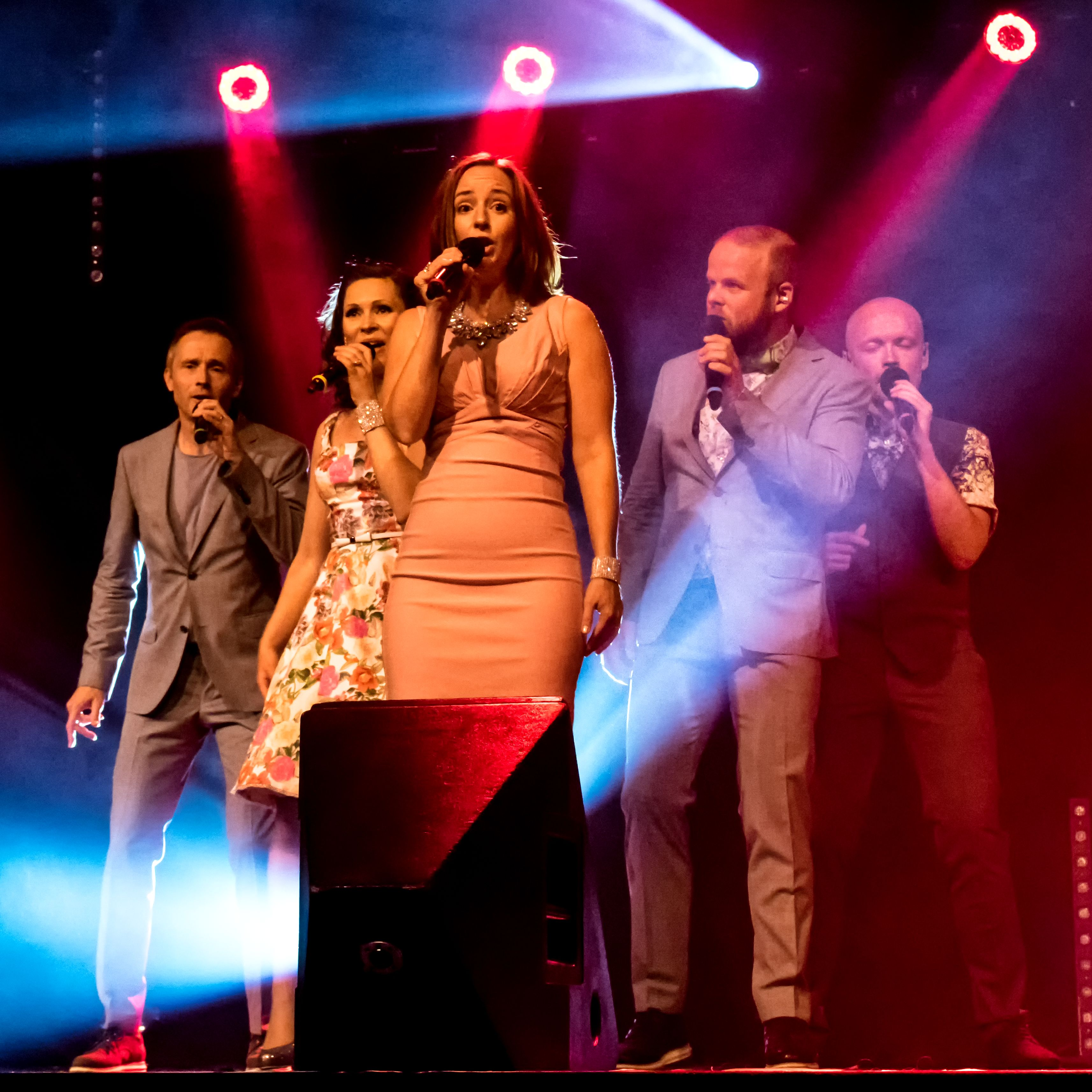 Bilder vom Zelt Musik Festival 2016 in Freiburg im Breisgau Die A capella Band "The real Group"